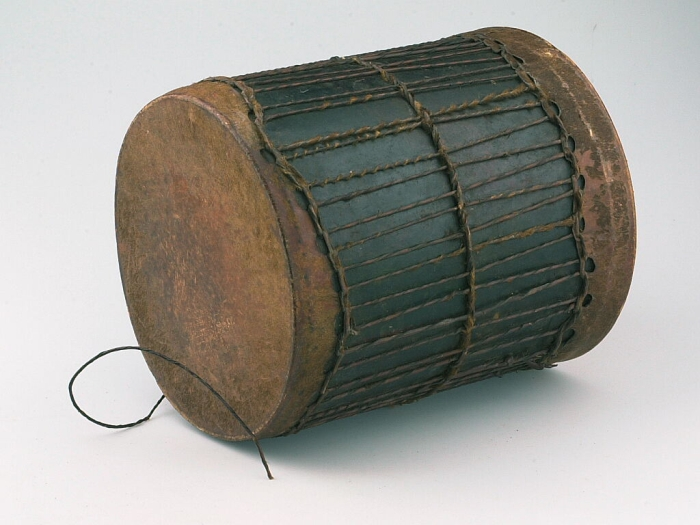 Dit instrument is een mooi voorbeeld van zg.'tweede gebruik', omdat het tromlichaam van een oud blik gemaakt is. Volgens de verkoper is deze trom bedoeld om mensen op te roepen naar de kerk te komen. De trom is gekocht te Mumias.